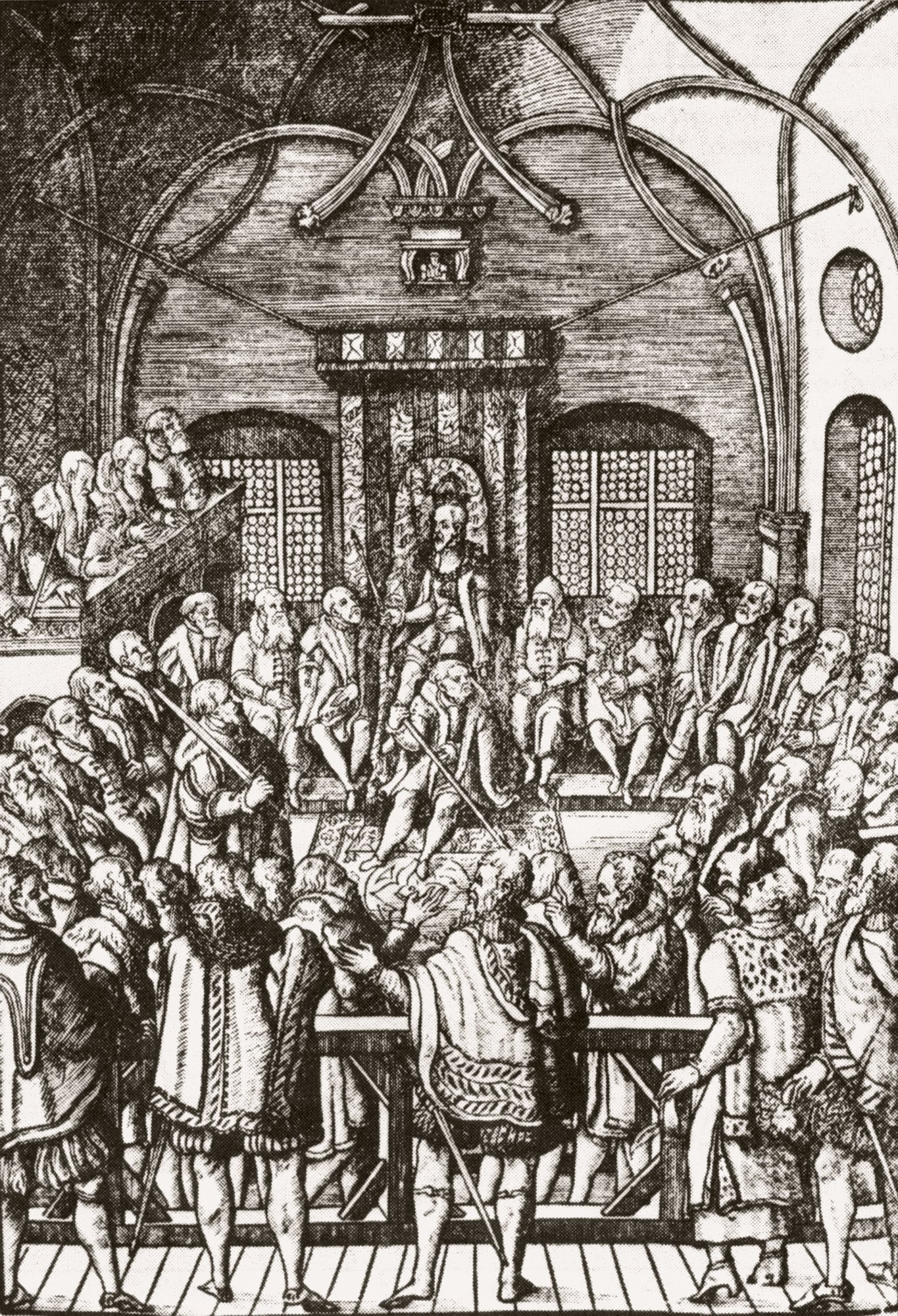 Zasedání zemského soudu, ilustrace z knihy Práva a zřízení zemská Českého království od Vřesovce z Vřesové z roku 1564